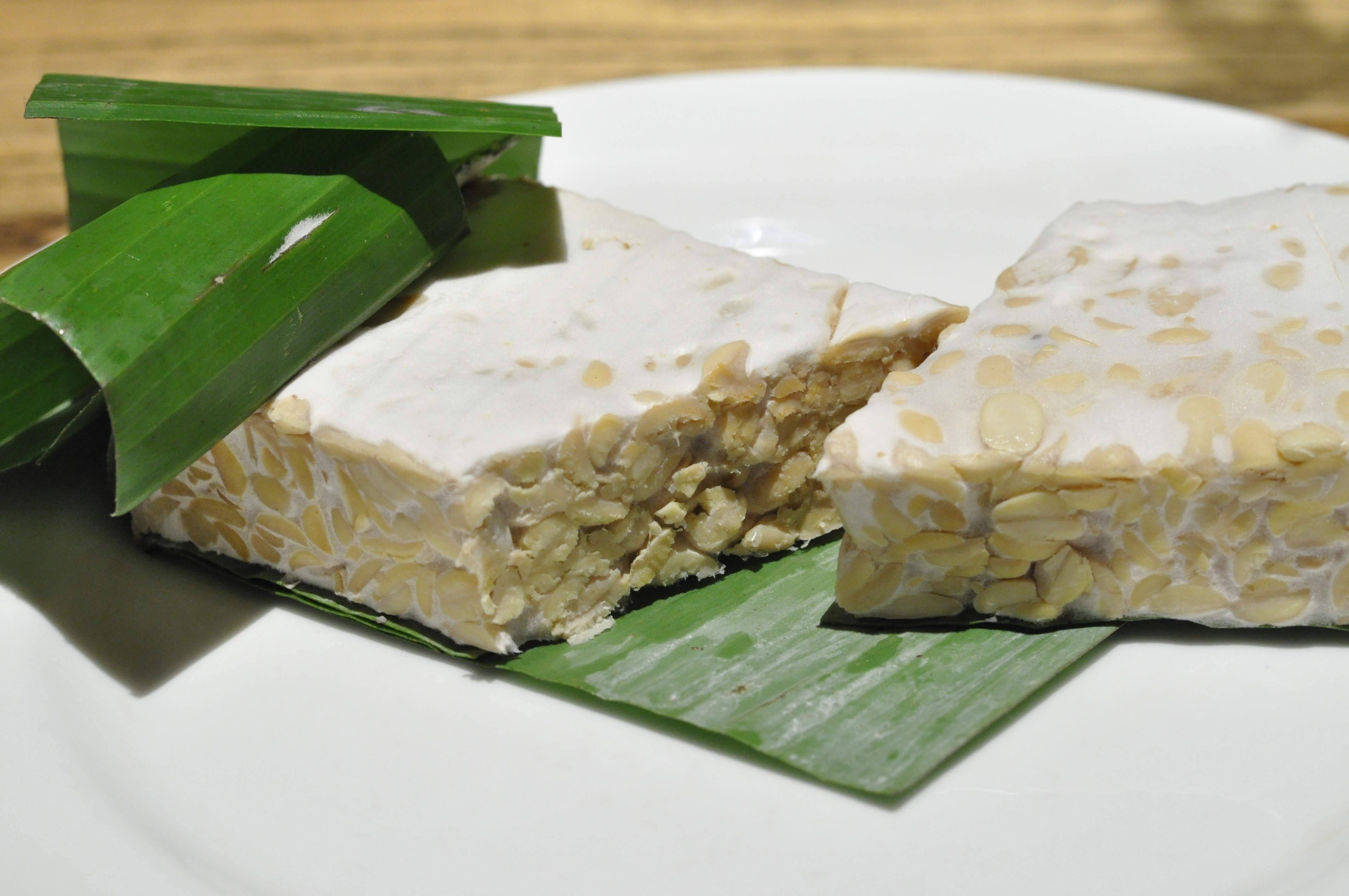 インドネシアの大豆発酵食品であるテンペ